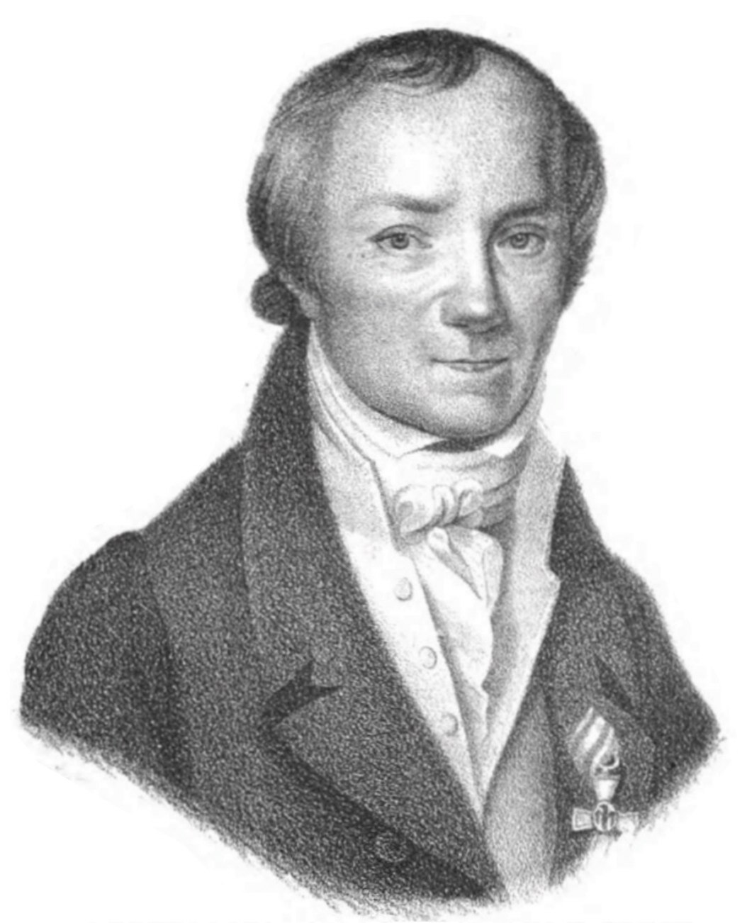 Apotheker und Pharmazeut Johann Bartholomäus Trommsdorff (* 8. Mai 1770 in Erfurt; † 8. März 1837 ebenda) Prof. der Chemie (1795, Erfurt)